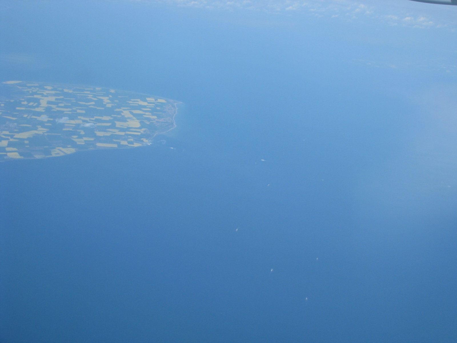 ബാൾട്ടിക്ക് കടൽ ജർമ്മനിയുടെ സമീപത്തു് നിന്നു്